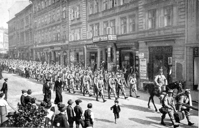 Ausmarsch der 6. Kompanie des K. u. k. Infanterie-Regiments Nr. 73 aus Eger nach der Mobilmachung am 1. August 1914.